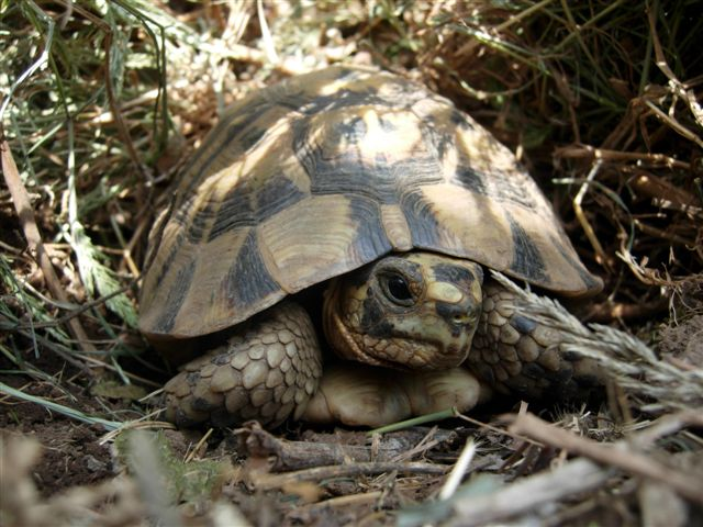 Testudo graeca sarda